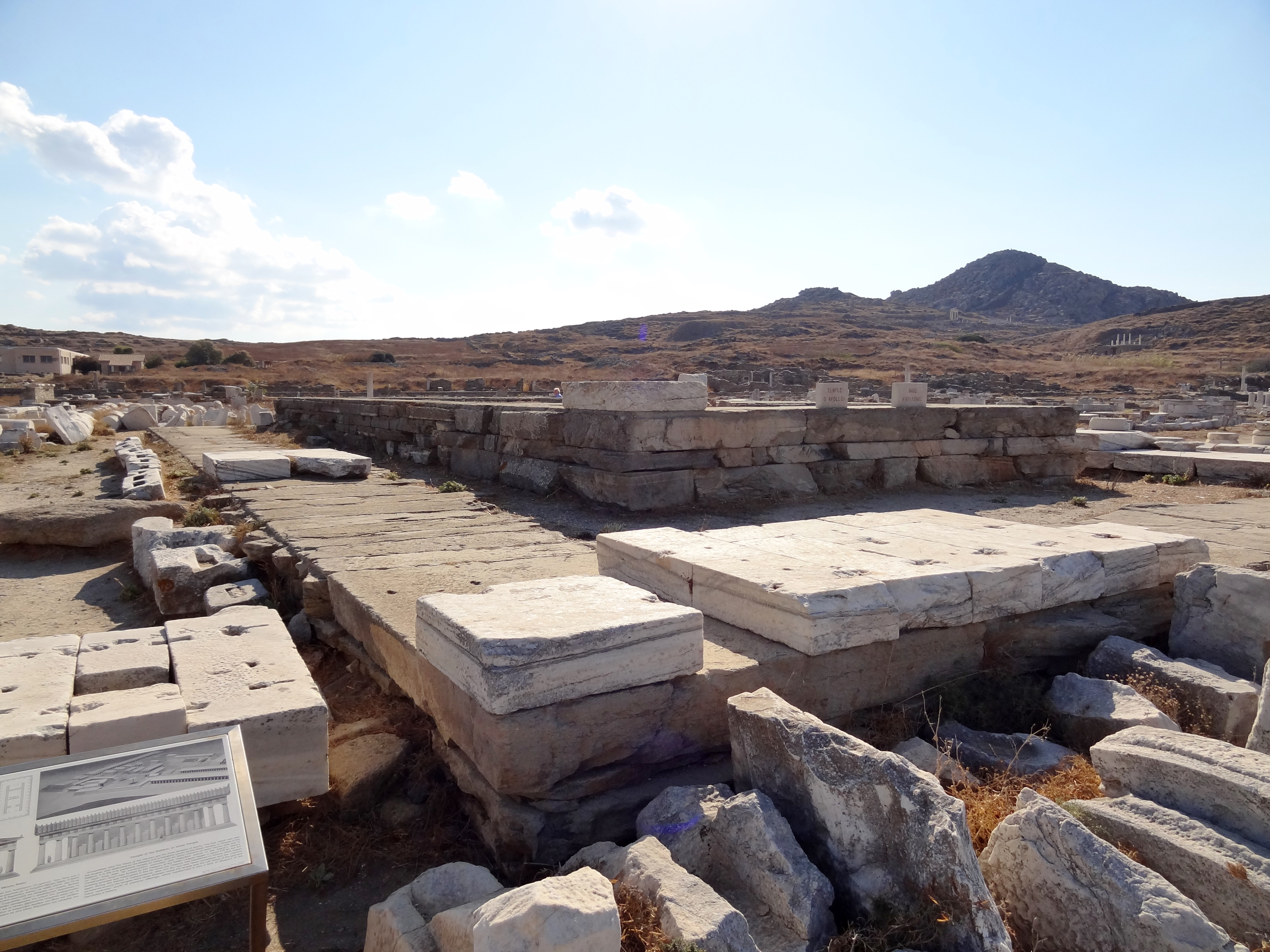 Großer Apollon-Tempel der Delier in der Ausgrabungsstätte von Delos, Kykladen, Griechenland